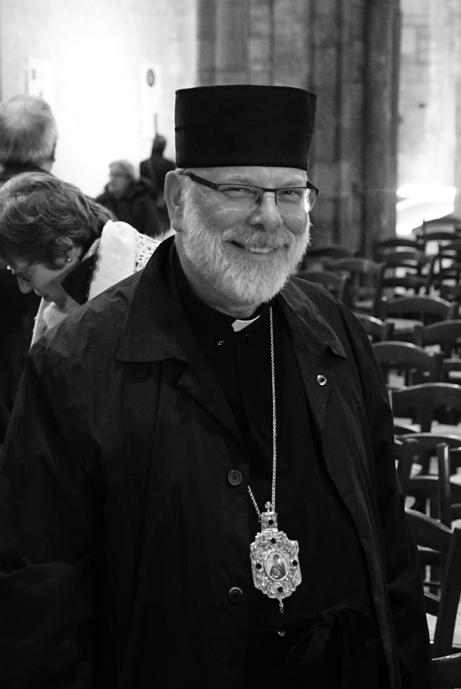 rencontre en l'honneur de l'anniversaire de mariage puis le couronnement d'Anne de Kiev donné en la basilique st-Remi.